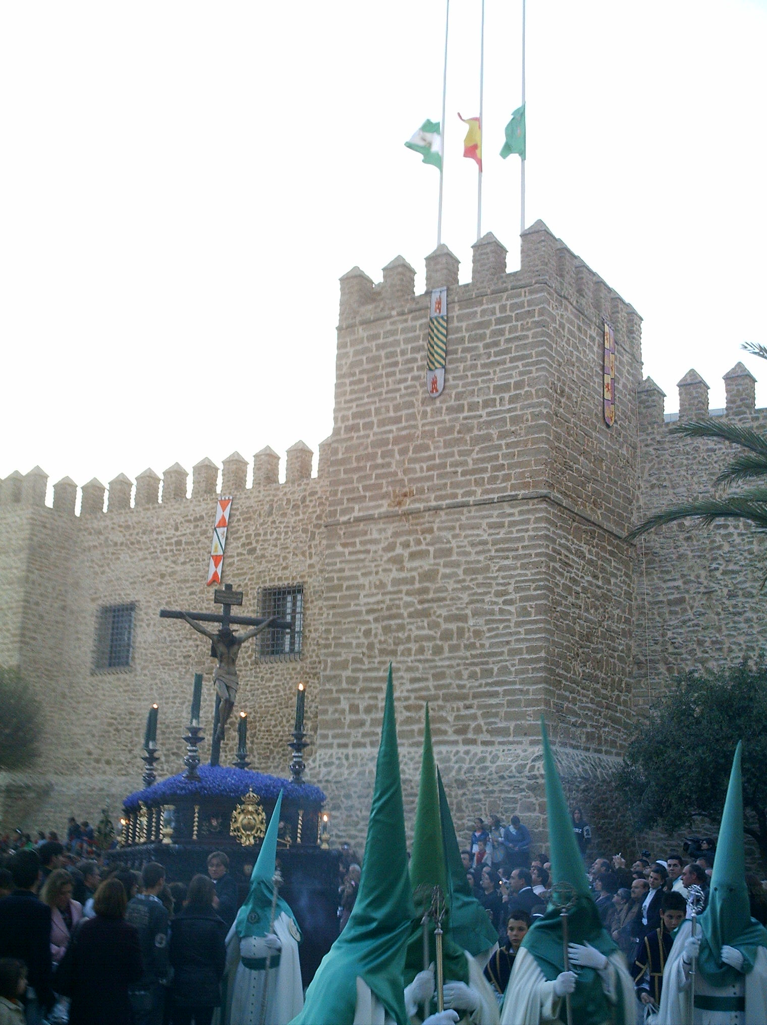 Cristo de la Veracruz a su paso por el Castillo de Luna de Rota (Cádiz)